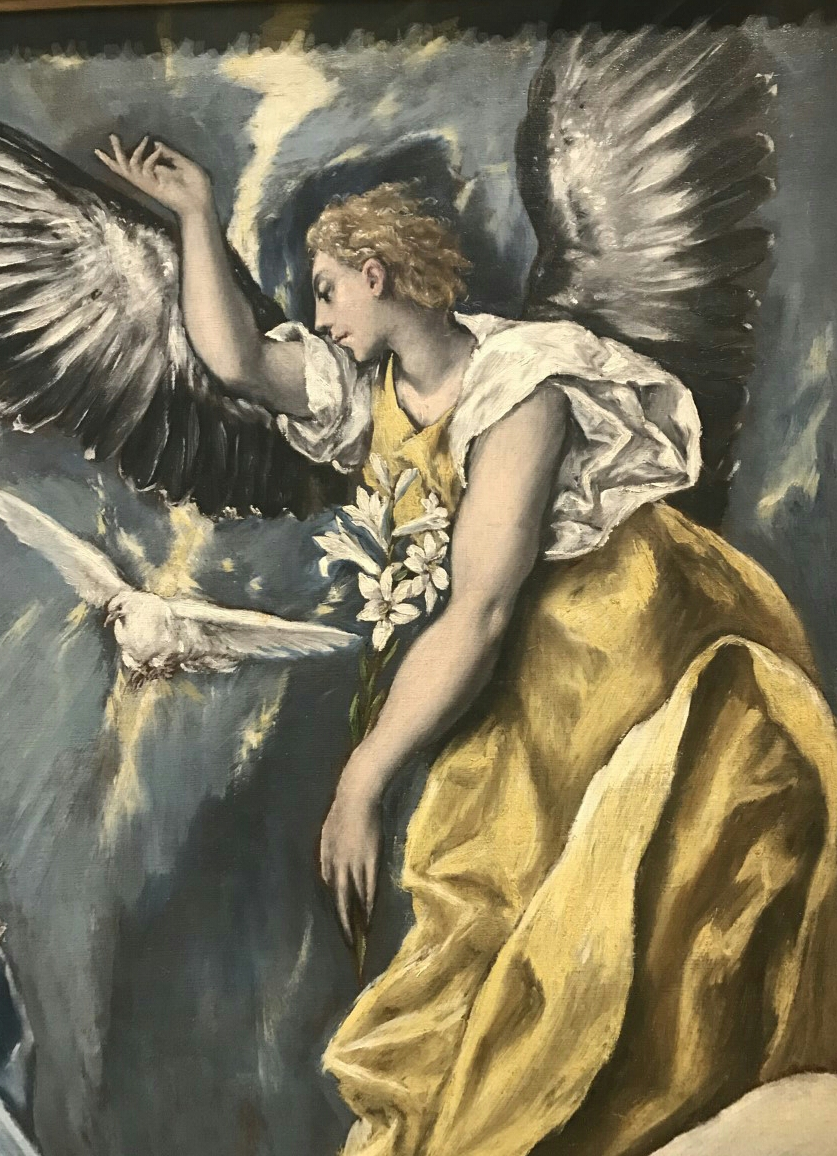 Le Greco, détail de L'Annonciation (1600-1610) du Musée des beaux-arts de Budapest (Hongrie).